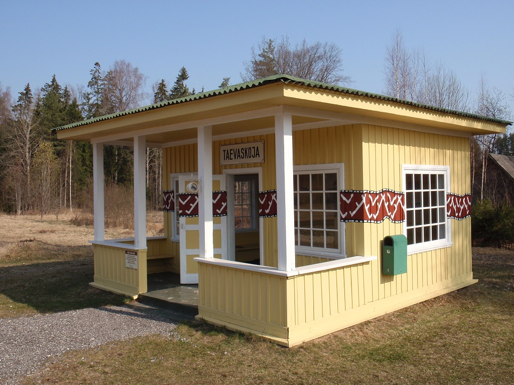 Ootepaviljon Taevaskoja raudteejaamas